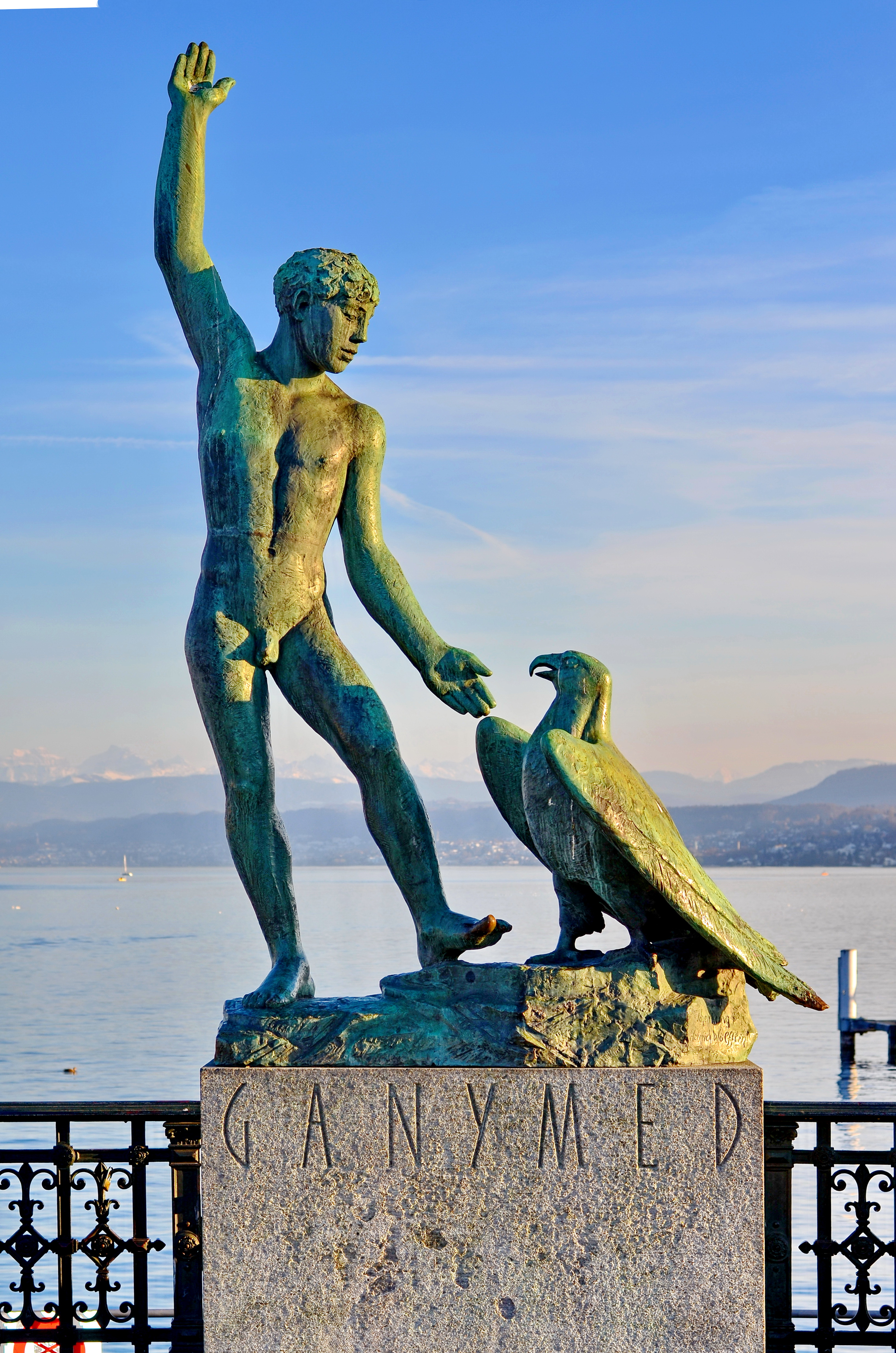 Ganymed, Bürkliplatz in Zürich (Switzerland)